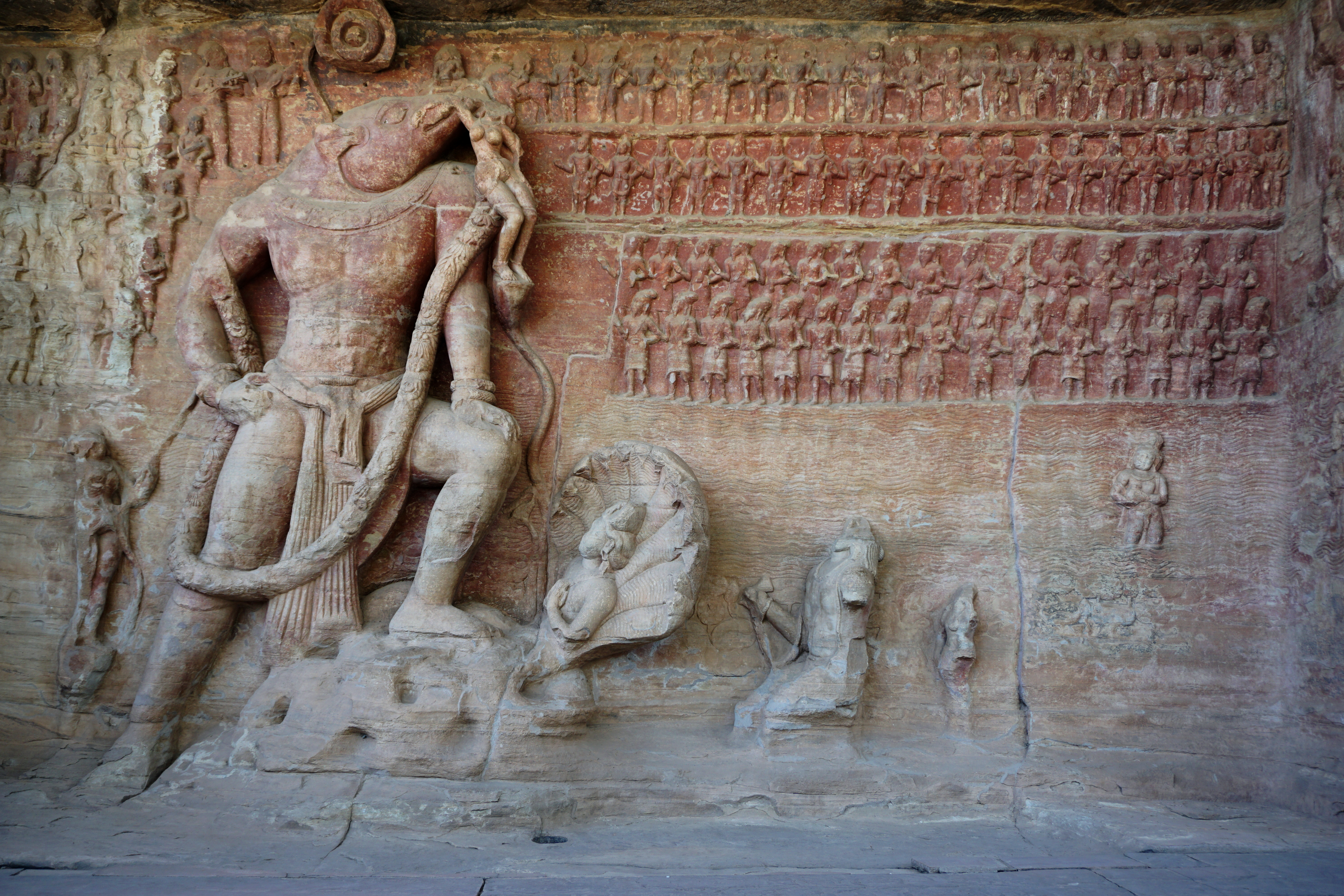 Udayagiri Caves, Vidisha, India